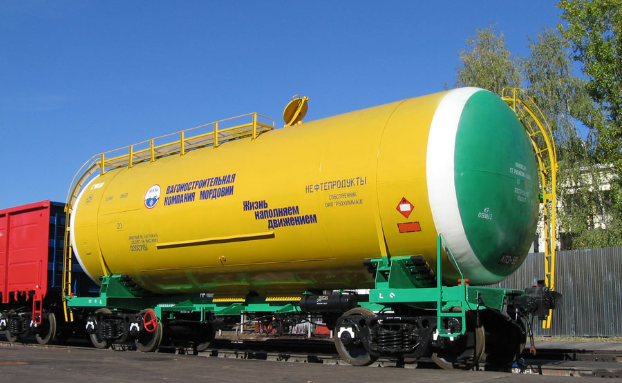 russian Tank car